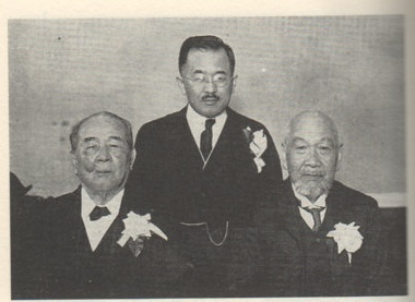 野依秀市（中）と「二大恩人」、渋沢栄一（左）と三宅雪嶺（右）。